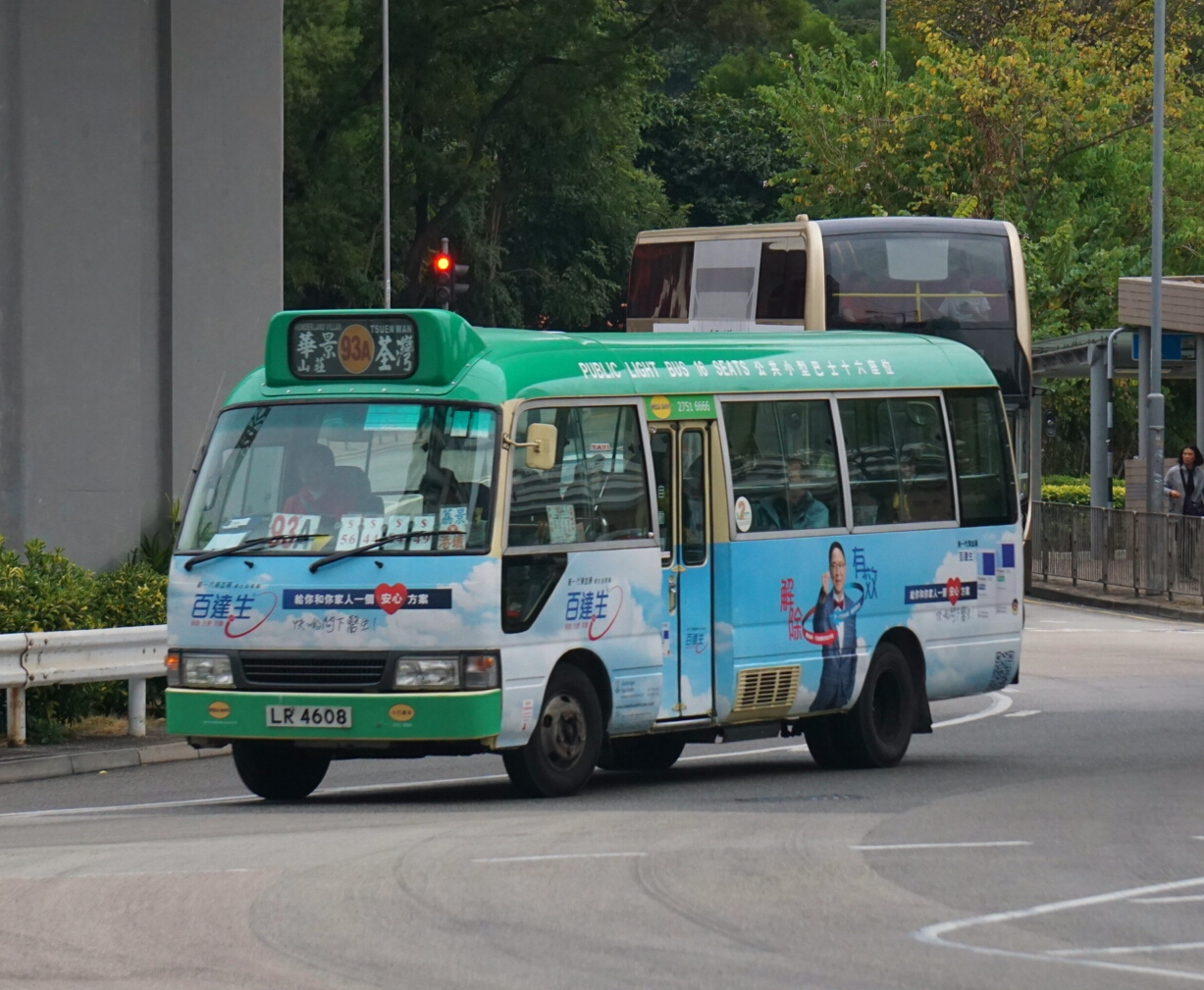 中文（香港）: 新界區專線小巴93A線，正途經葵福路近貨櫃碼頭路交匯處